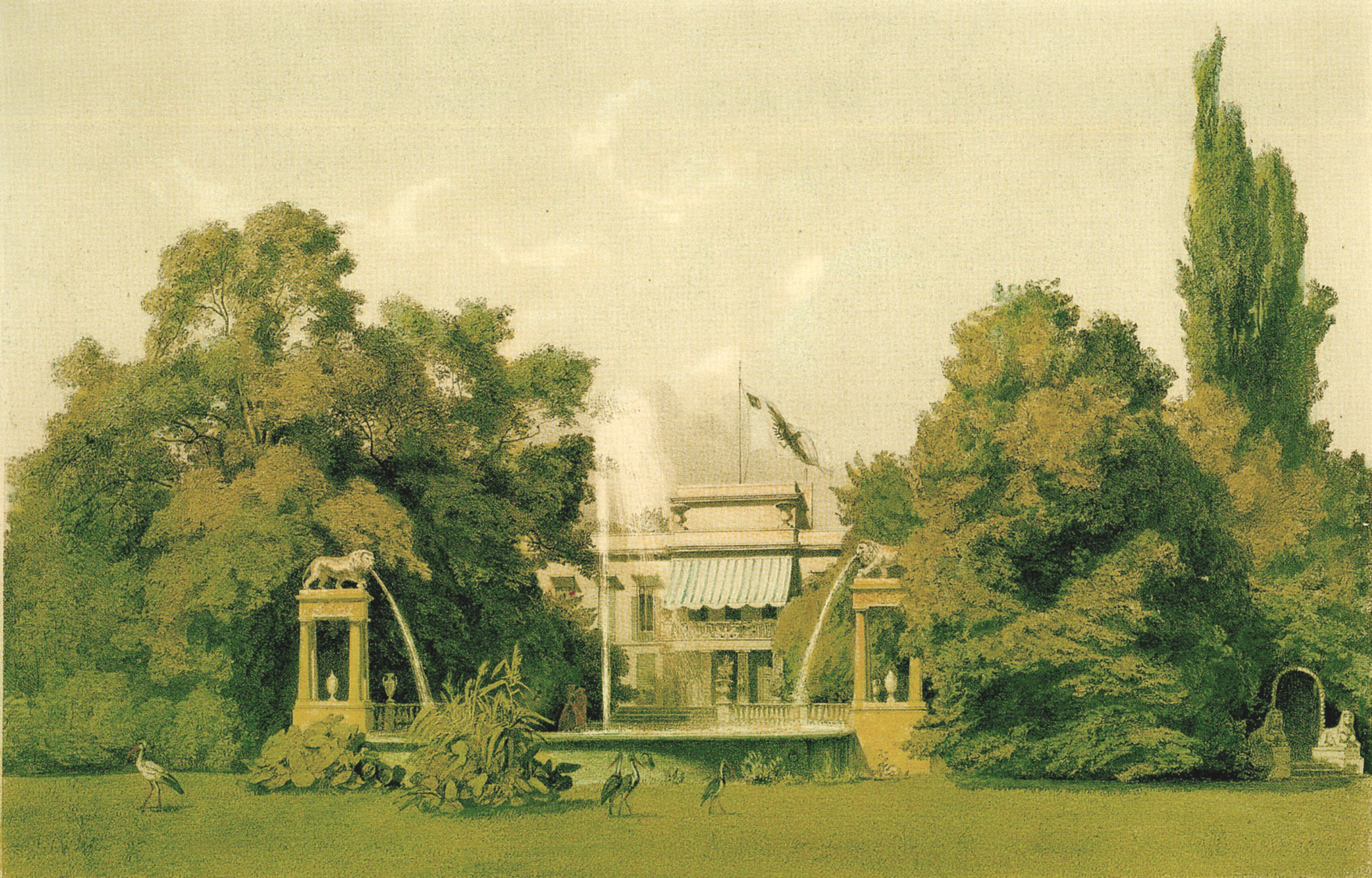 Löwenfontäne (Valentin Ruths, um 1850)